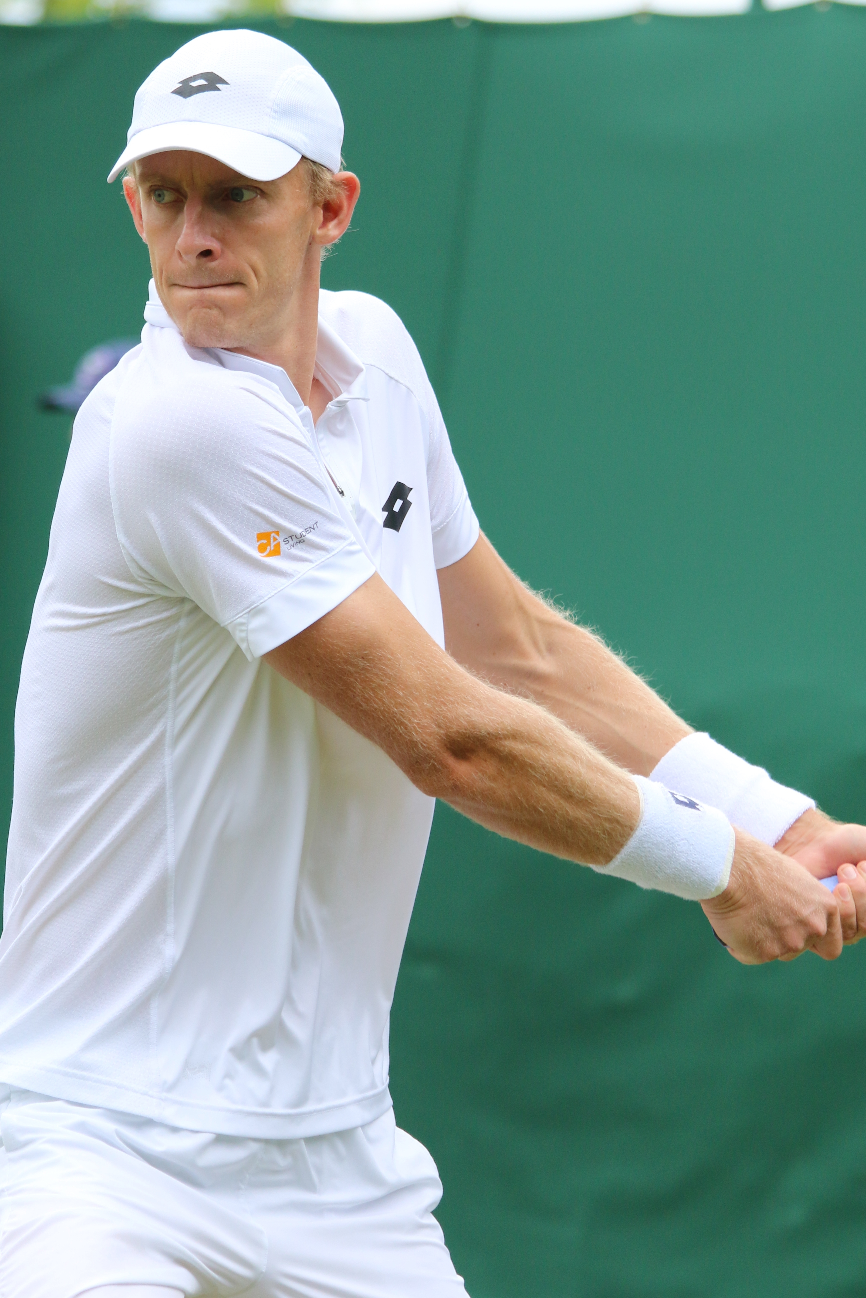 Anderson WM17 (5)